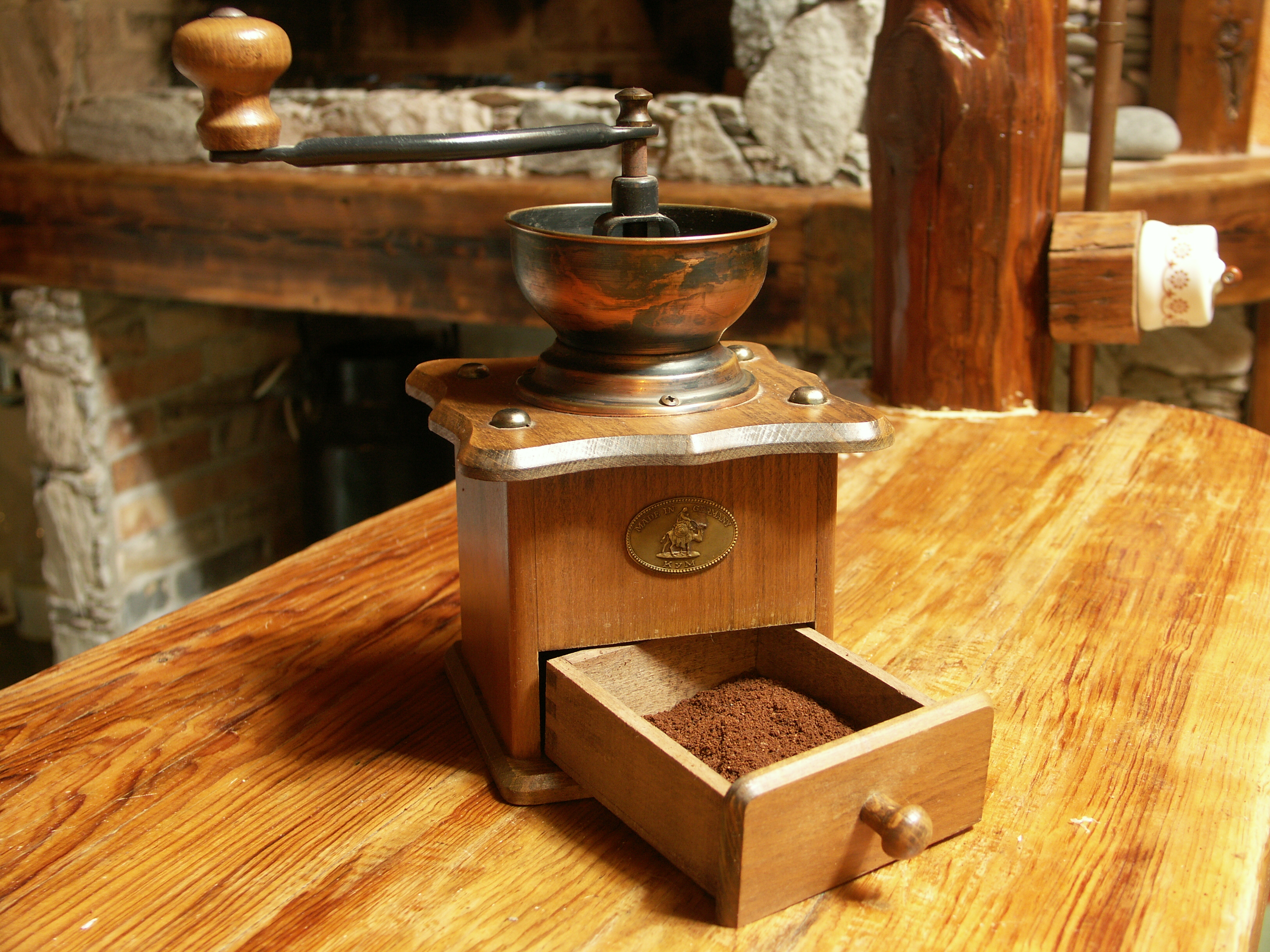 Handkaffee-Mühle Kaffeemühle